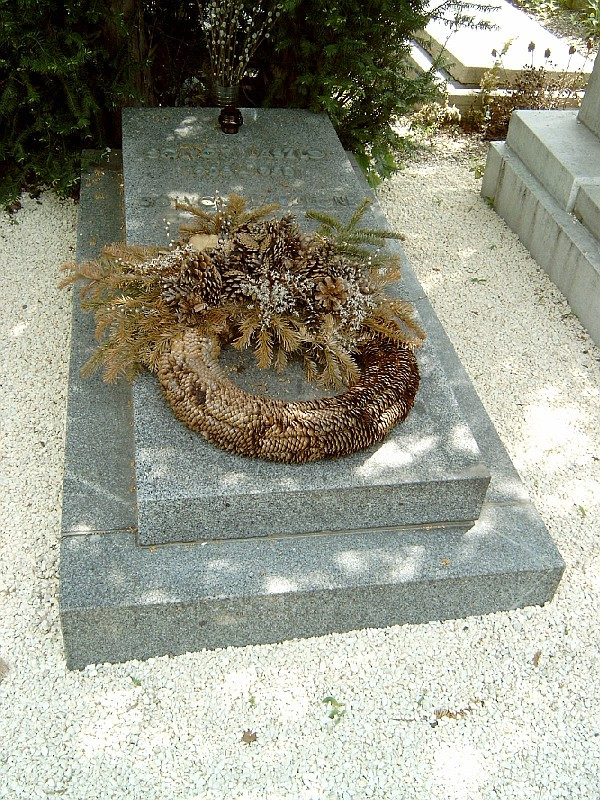 Sólyom László (Muraszombat, 1908. dec. 17. – Bp., 1950. aug. 19.) altábornagy sírja Budapesten. Farkasréti temető: 30/2-1-94.